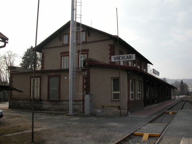 Bahnhof Vrchlabí